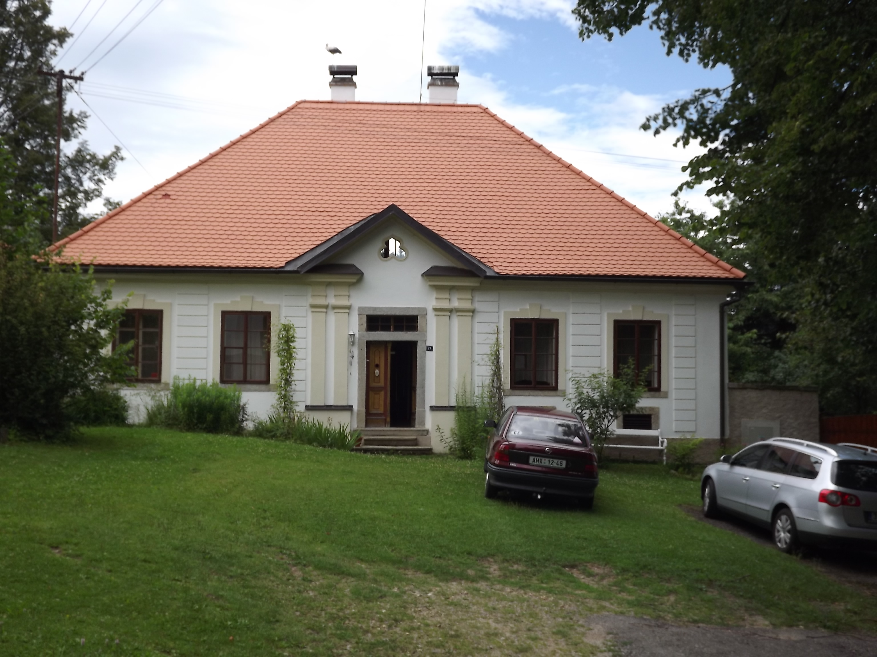 Fara (Skála), nad vsí 27, Skála